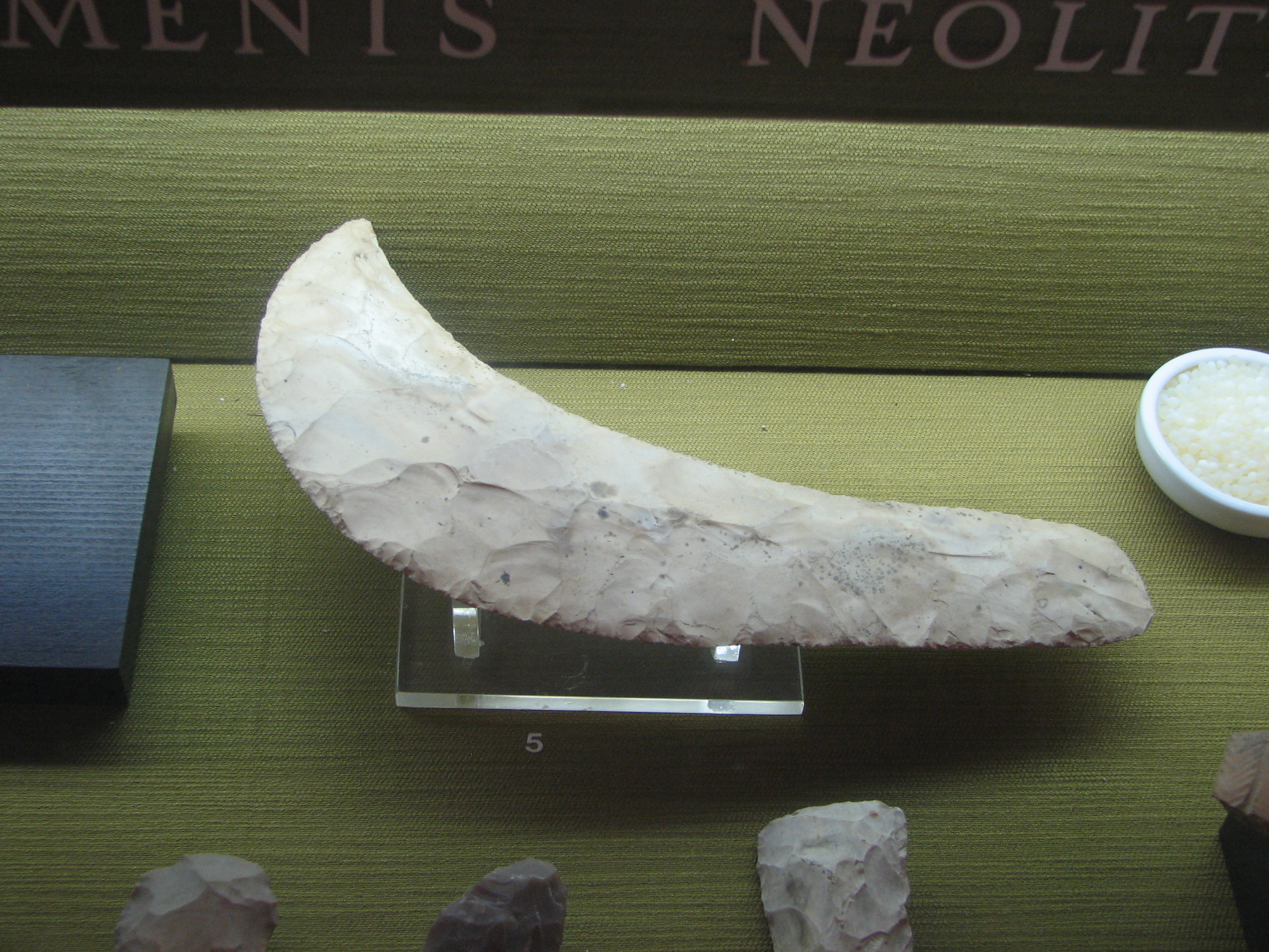 Dagon Museum, Downtown, Haifa, Israel The Museum is dedicated to the history of grain product. Sickle made of flint, Egypt, Naqada period, end of the fourth millennium BC מוזיאון דגון בעיר התחתית בחיפה שוכן במבנה המשרדים של ממגורות דגון. המוזיאון מוקדש לתולדות הדגן ומוצריו, וכלל ממצאים ארכאולוגים הקשורים בנושא וכן דגמים של מתקנים שונים בהם משתמשים בממגורות דגון מגל עשוי צור, מצרים, תקופת נקאדה, סוף האלף הרביעי לפני הספירה